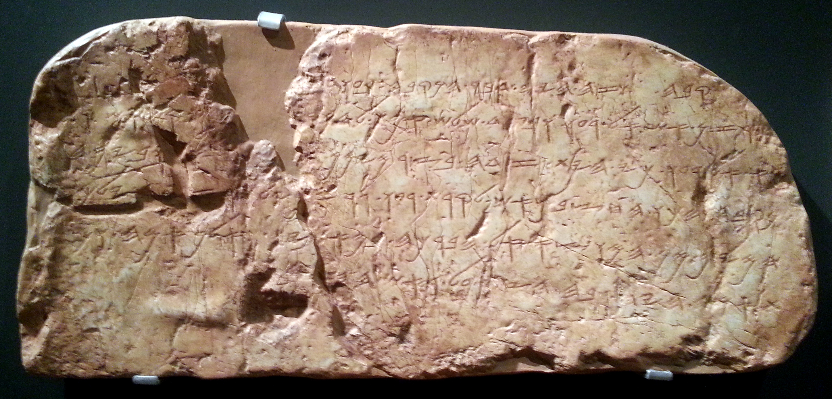 העתק כתובת השילוח (המקור במוזאון הארכאולוגי באיסטנבול) מוצג במוזאון ישראל בירושלים